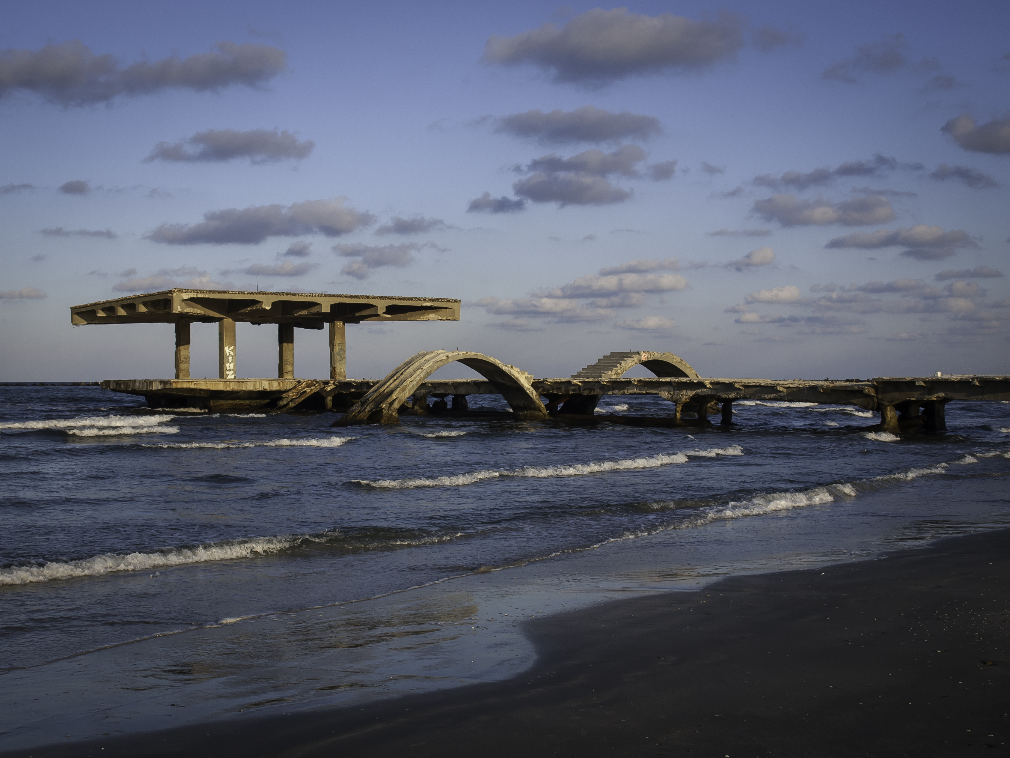 Pod cu bar maritim - Cazino Mamaia 03